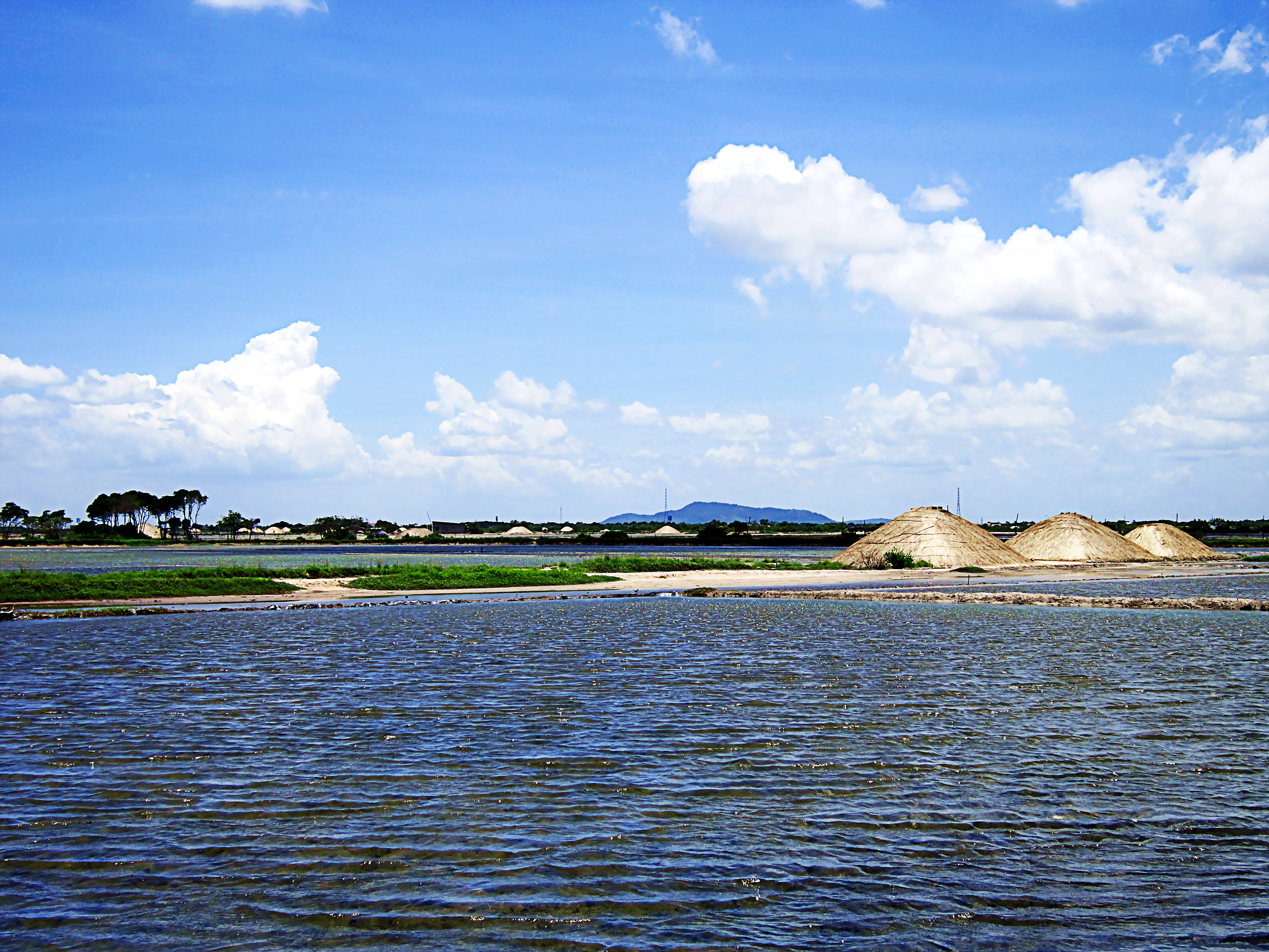 Đồng muối ở xã An Ngãi, huyện Long Điền, tỉnh Bà Rịa - Vũng Tàu, Việt Nam.